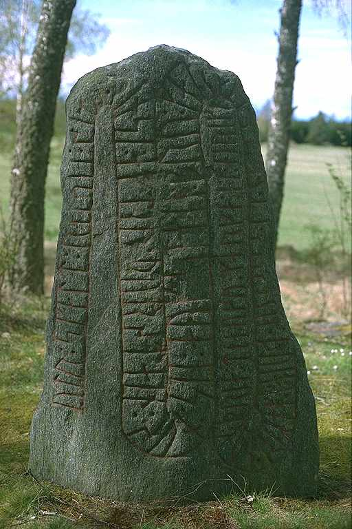 Inskriften lyder: Udd skald reste denna sten efter Torsten, sin son, och gjorde stenbro för (honom). Han ägde tre gårdar i hammarskifte och trettio marker innestående hos Erik.